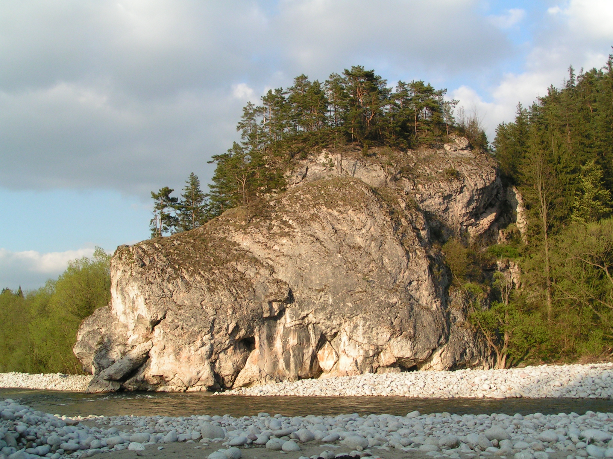 Przełom Białki